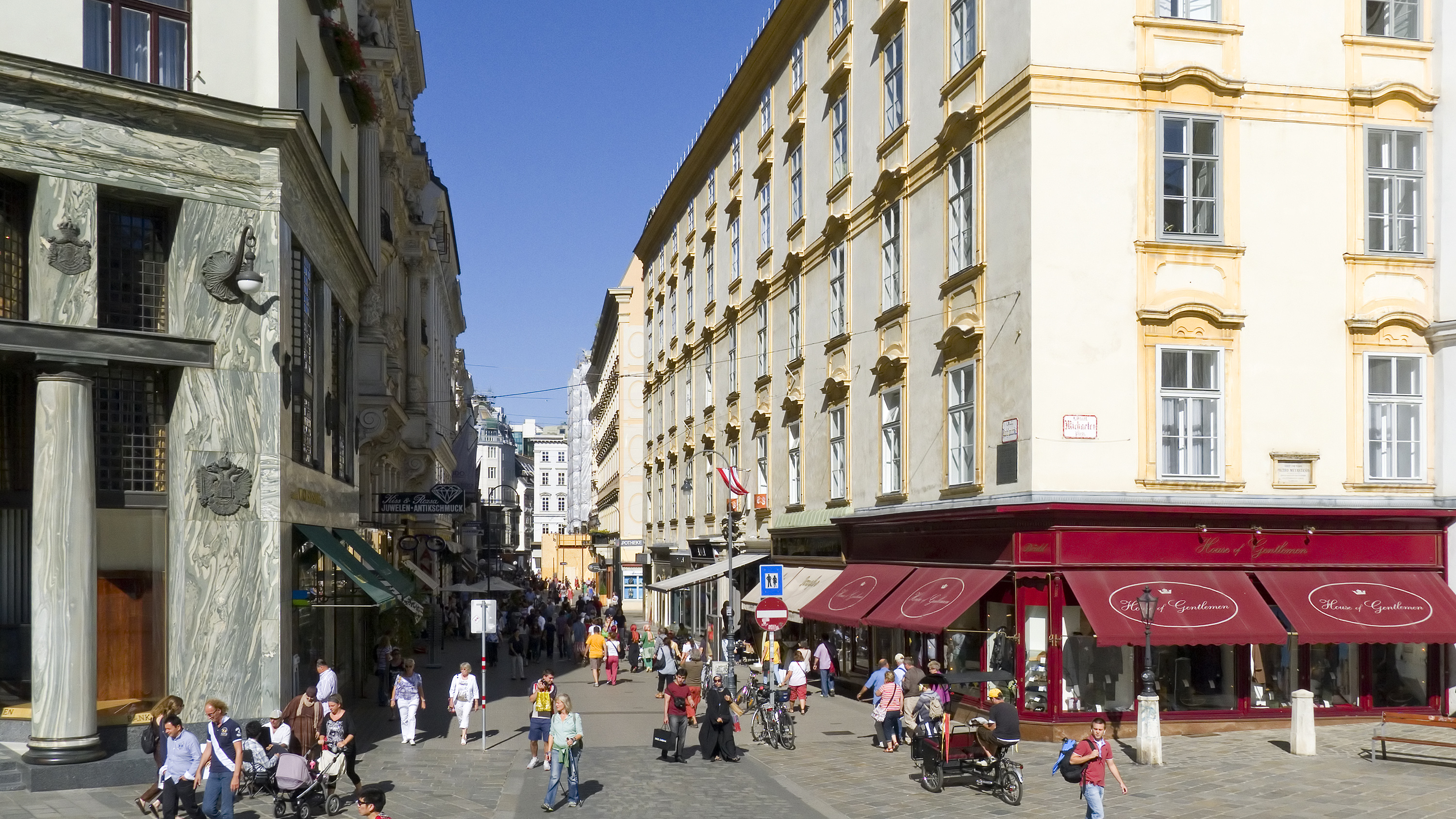 Kohlmarkt (Wien) in Wien 1 beim Michaelerplatz Richtung Nordosten